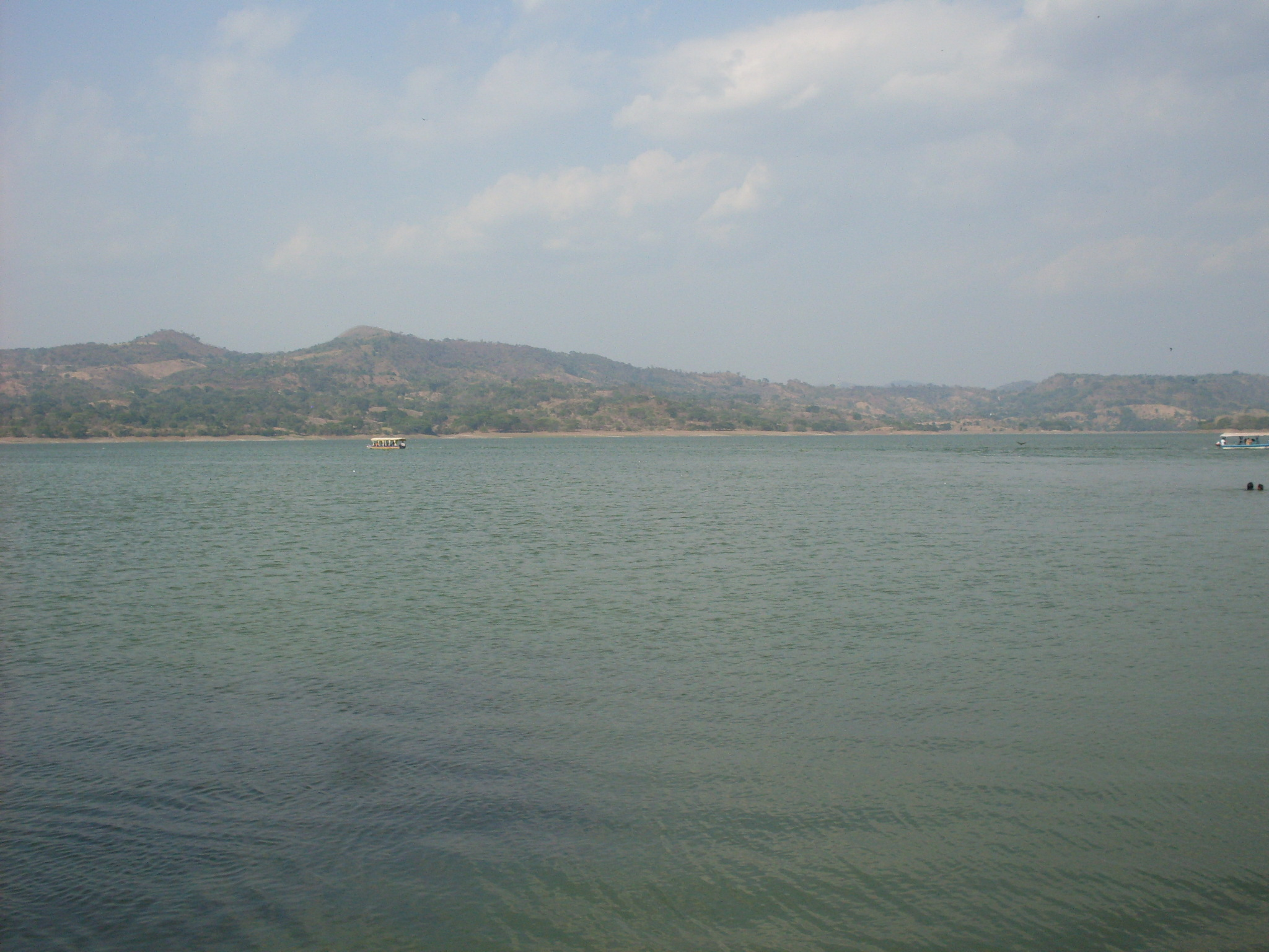 Vista del lago